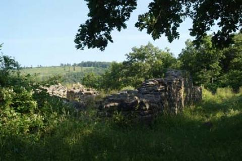 A Benevár romjai.